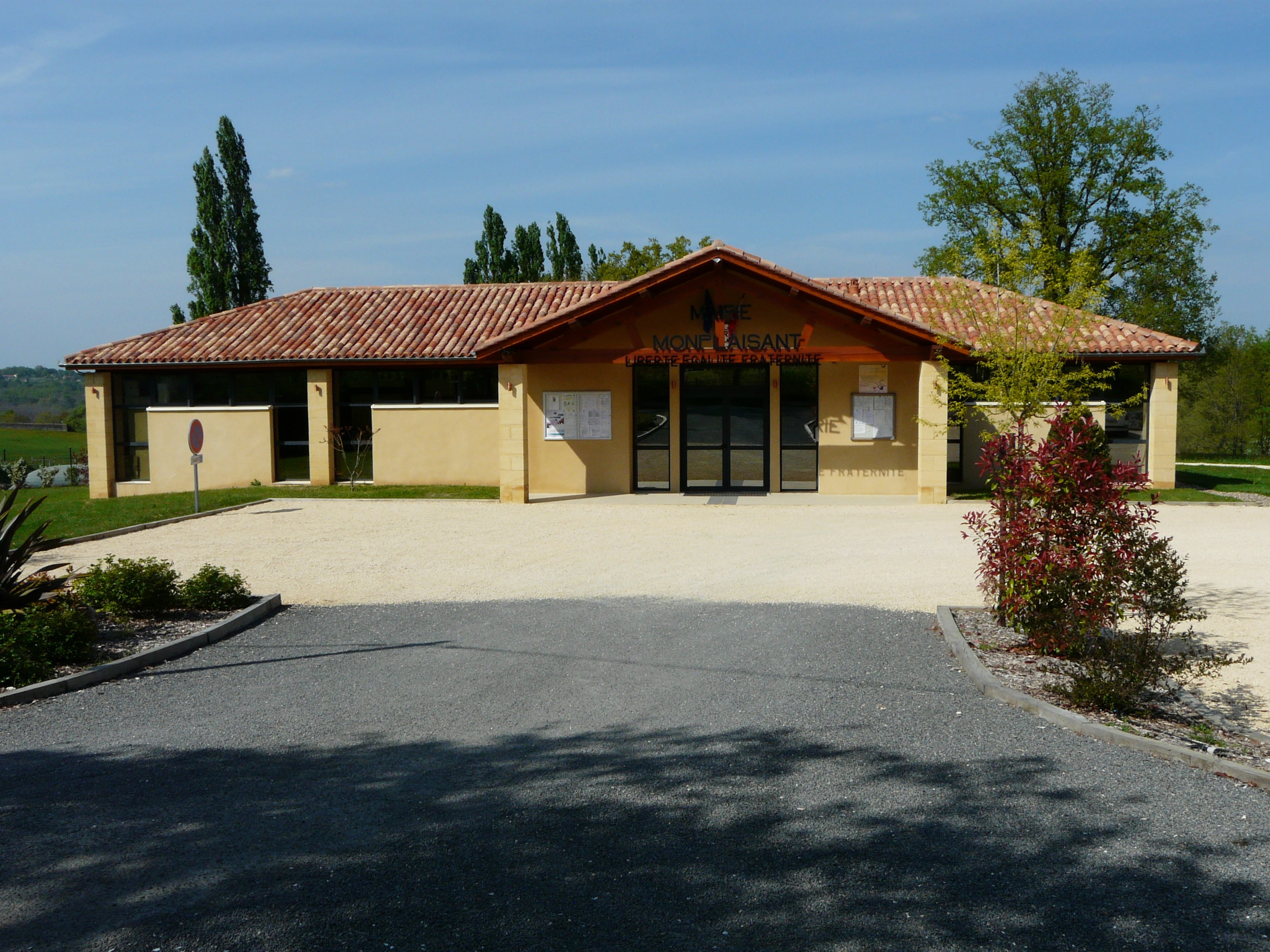 La mairie de Monplaisant, Dordogne, France.